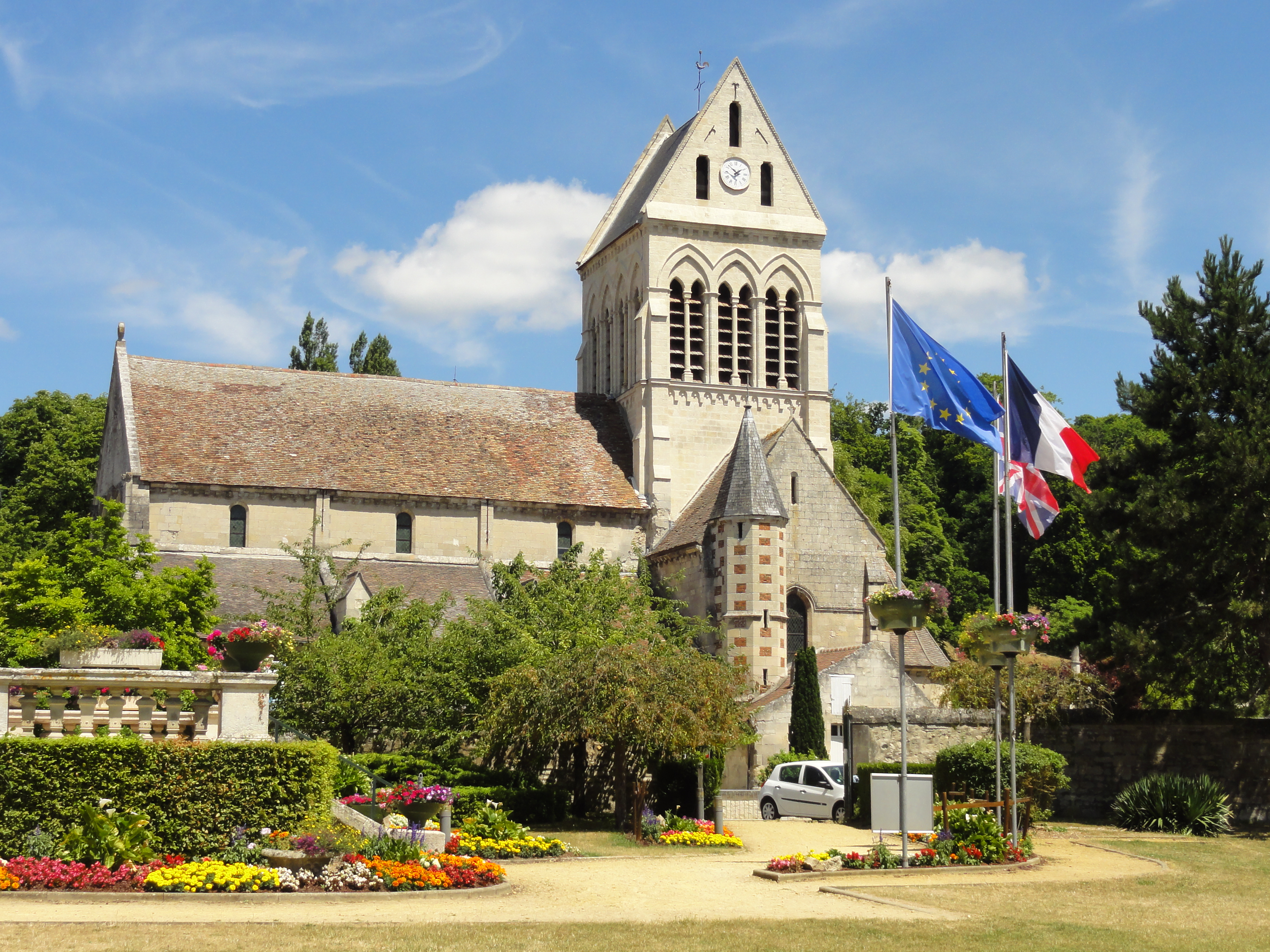 Église de la Sainte-Trinité de Choisy-au-Bac (voir titre).